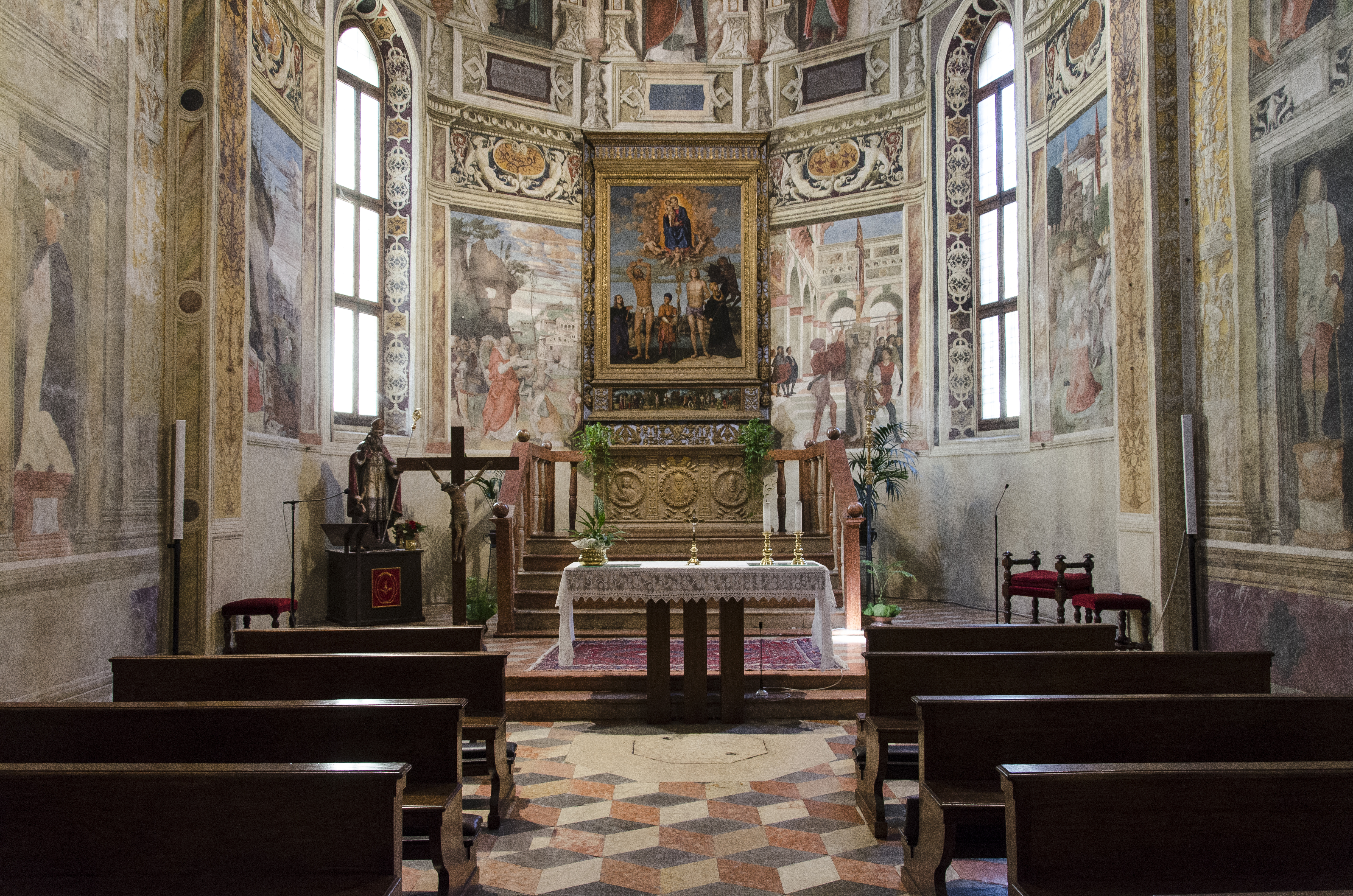 Chiesa dei Santi Nazaro e Celso a Verona. Interno, in stile rinascimentale.